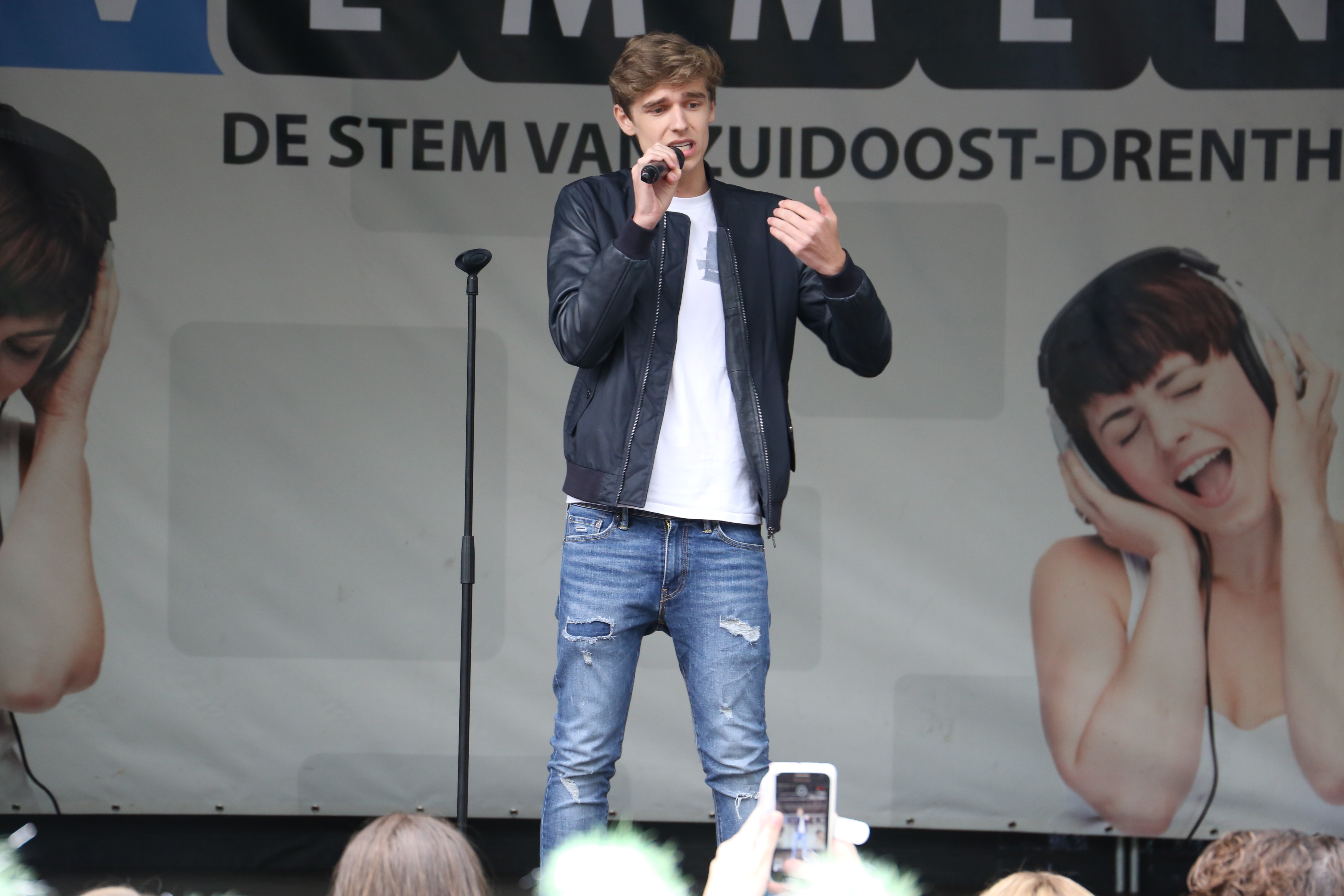 Ridder van Kooten tijdens Alles Kids in Drenthe 2016